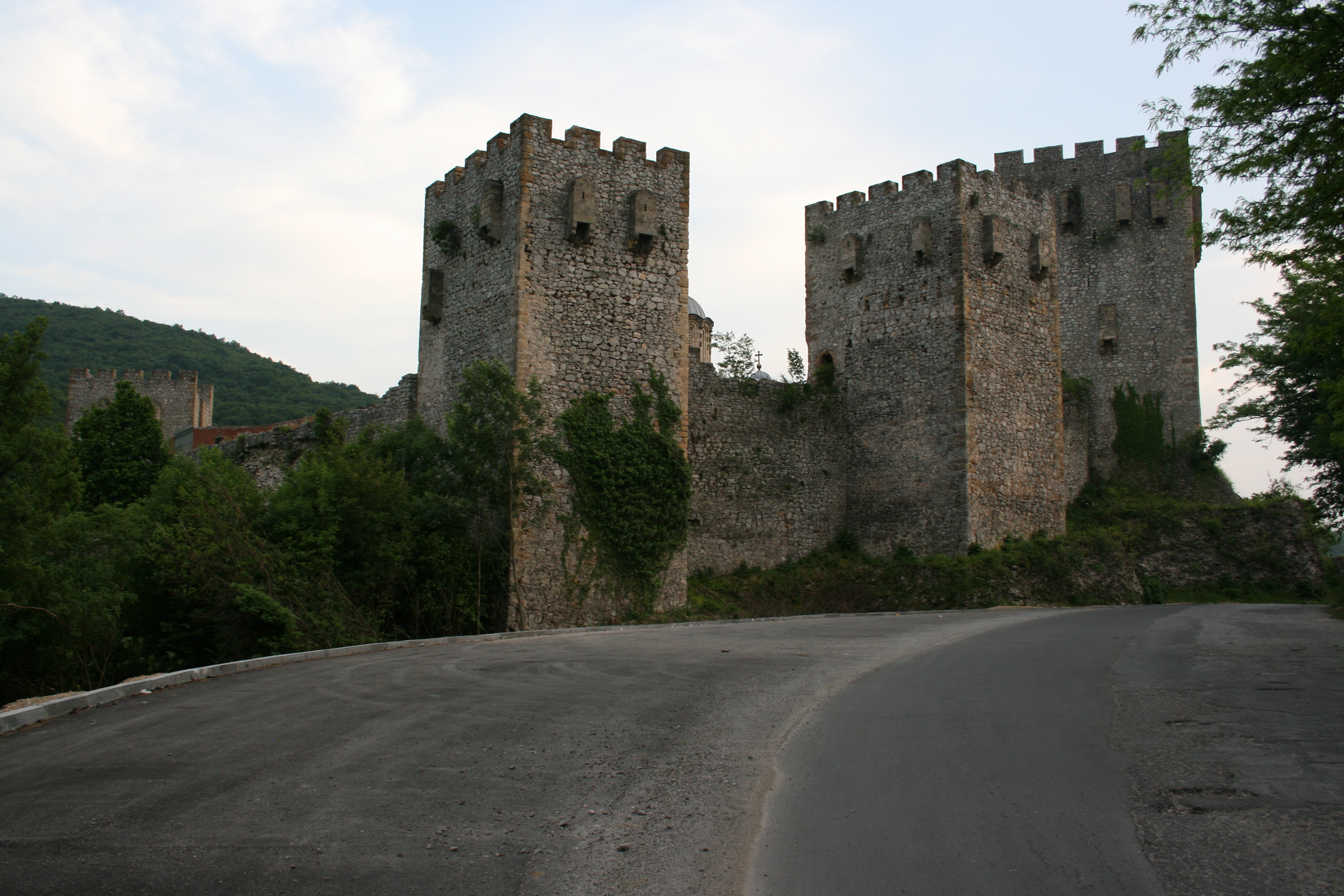 Serbia: Manasija Monastery.